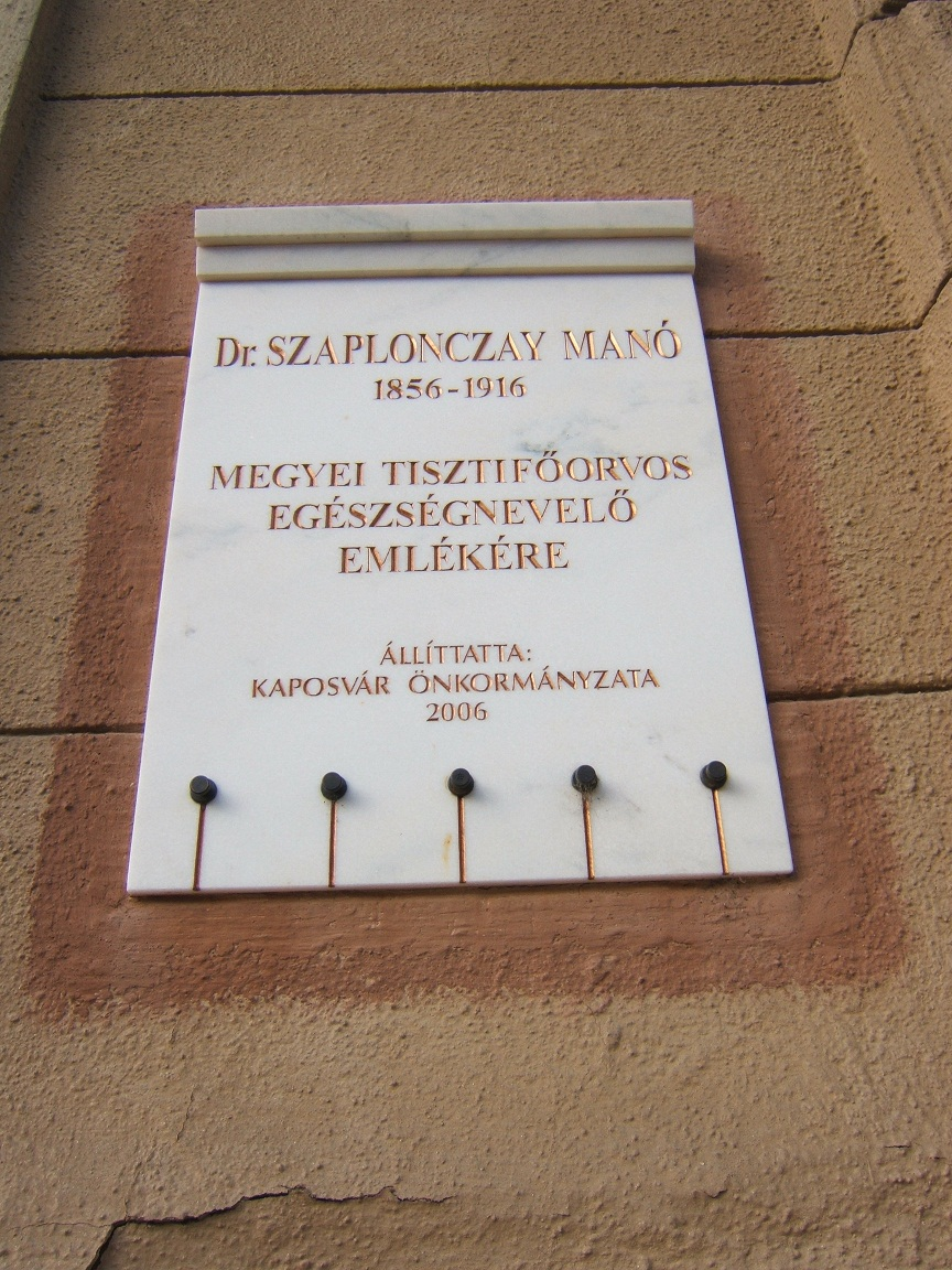 Kaposvár, Szaplonczay-emléktábla